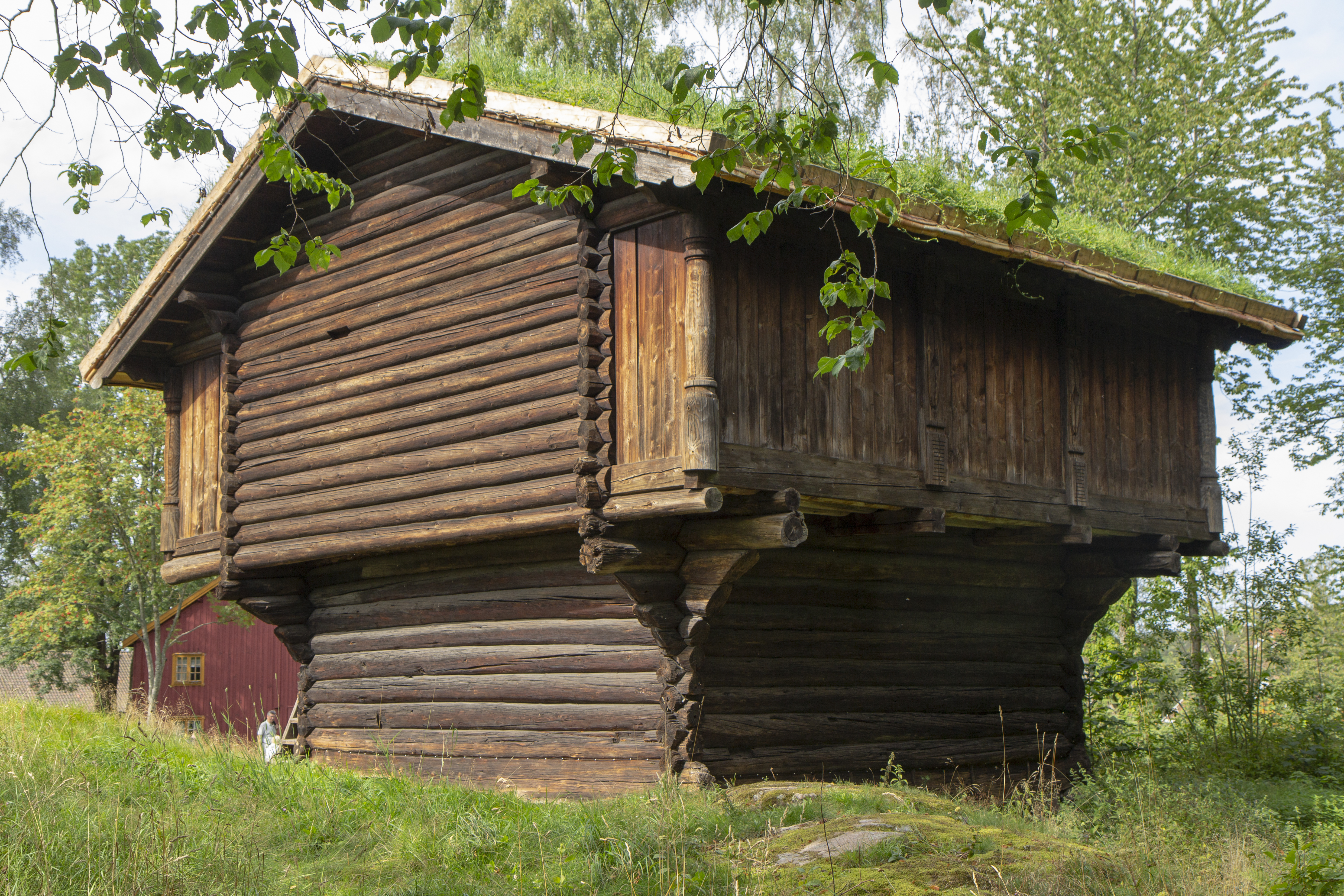 TønsbergNorsk bokmål: TønsbergNorsk nynorsk: Tønsberg kommune